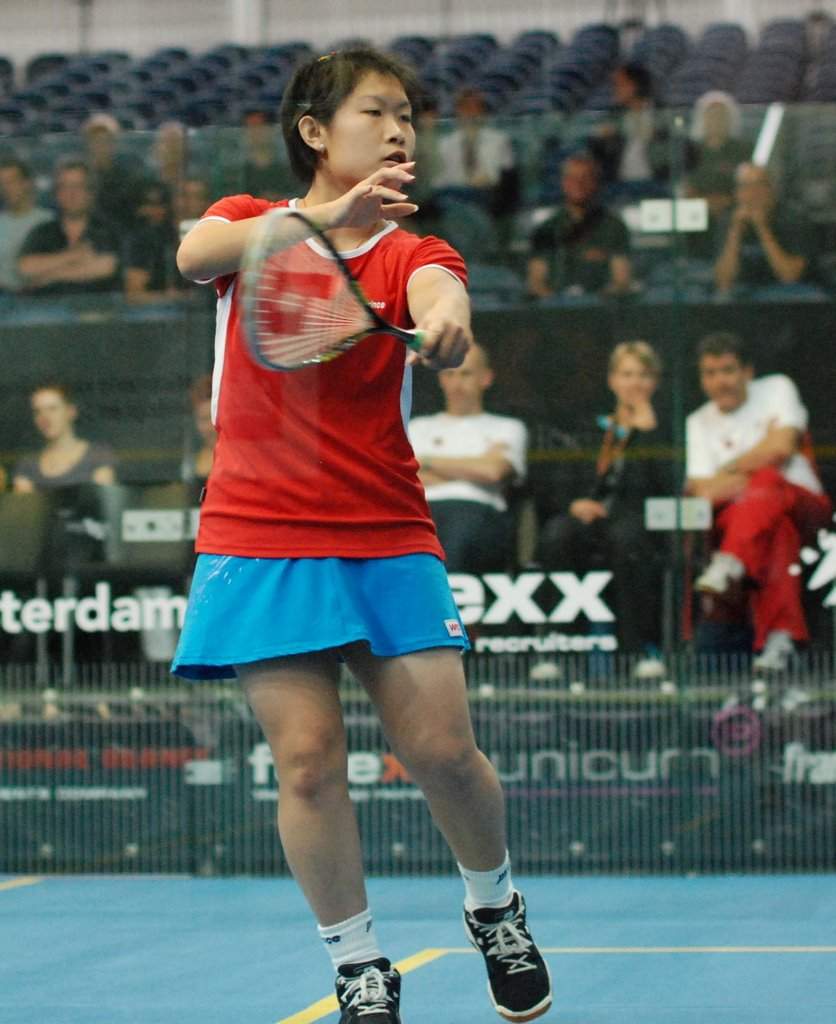 Annie Au